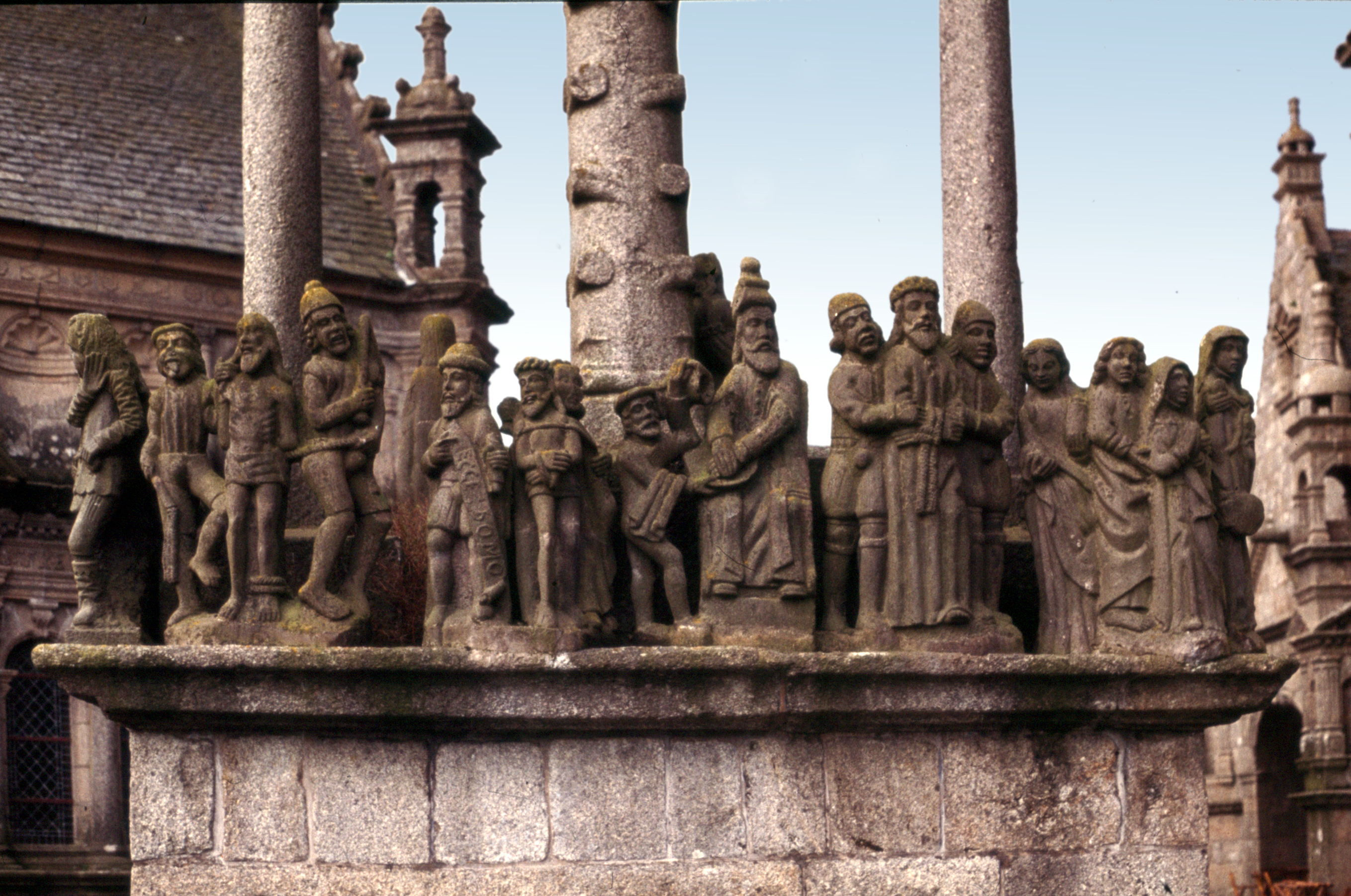 Saint-Thégonnec